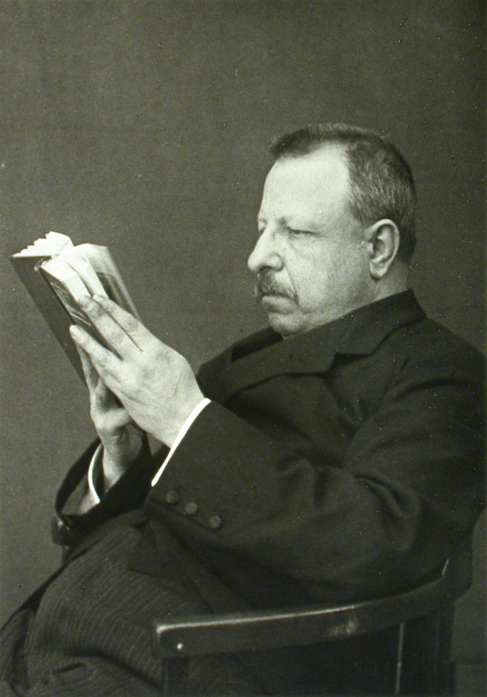 Foto di Benedetto Croce scattata dal prof. Arnaldo Polacco non più vivente da oltre 70 anni